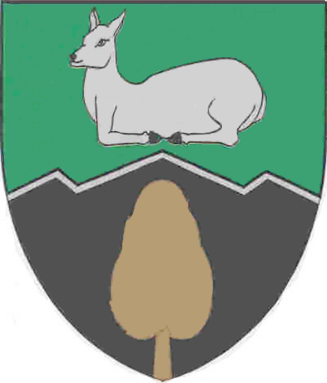 Das Wappen der Gemeinde Stössing zeigt einen spitzen Dreiberg, eine goldene Linde und eine Hirschkuh auf schwarz-grünem Hintergrund. Der spitze Dreiberg verweist auf den Hegerberg, die höchste Erhebung im Bezirk St. Pölten mit 655 Metern. Ebenso wurde die 1988 gepflanzte Linde anlässlich der in diesem Jahr wiedererlangten Selbständigkeit in das Wappen aufgenommen. 1971 wurde Stössing mit Kasten bei Böheimkirchen vereinigt und erst 17 Jahre später wieder getrennt. Die Hirschkuh nimmt auf den Kirchenpatron, den Heiligen Ägydius, Bezug, welcher immer mit einer Hirschkuh abgebildet ist. Die grüne und schwarze Schildfarbe steht für den Wiesen- und Waldreichtum im Gemeindegebiet sowie für die engen Täler des Alpenvorlandes.